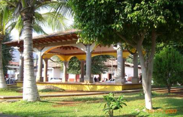 Plaza principal de turicato mich. mx.